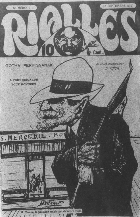 Portrait de Joseph Denis maire de Perpignan par D. Vinça en couverture du journal Rialles (Perpignan) en 1912